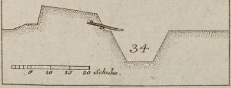 Grabenschnitt mit verschiedenen Befestigung - Tafel 10, Sturmpfähle Nr.34